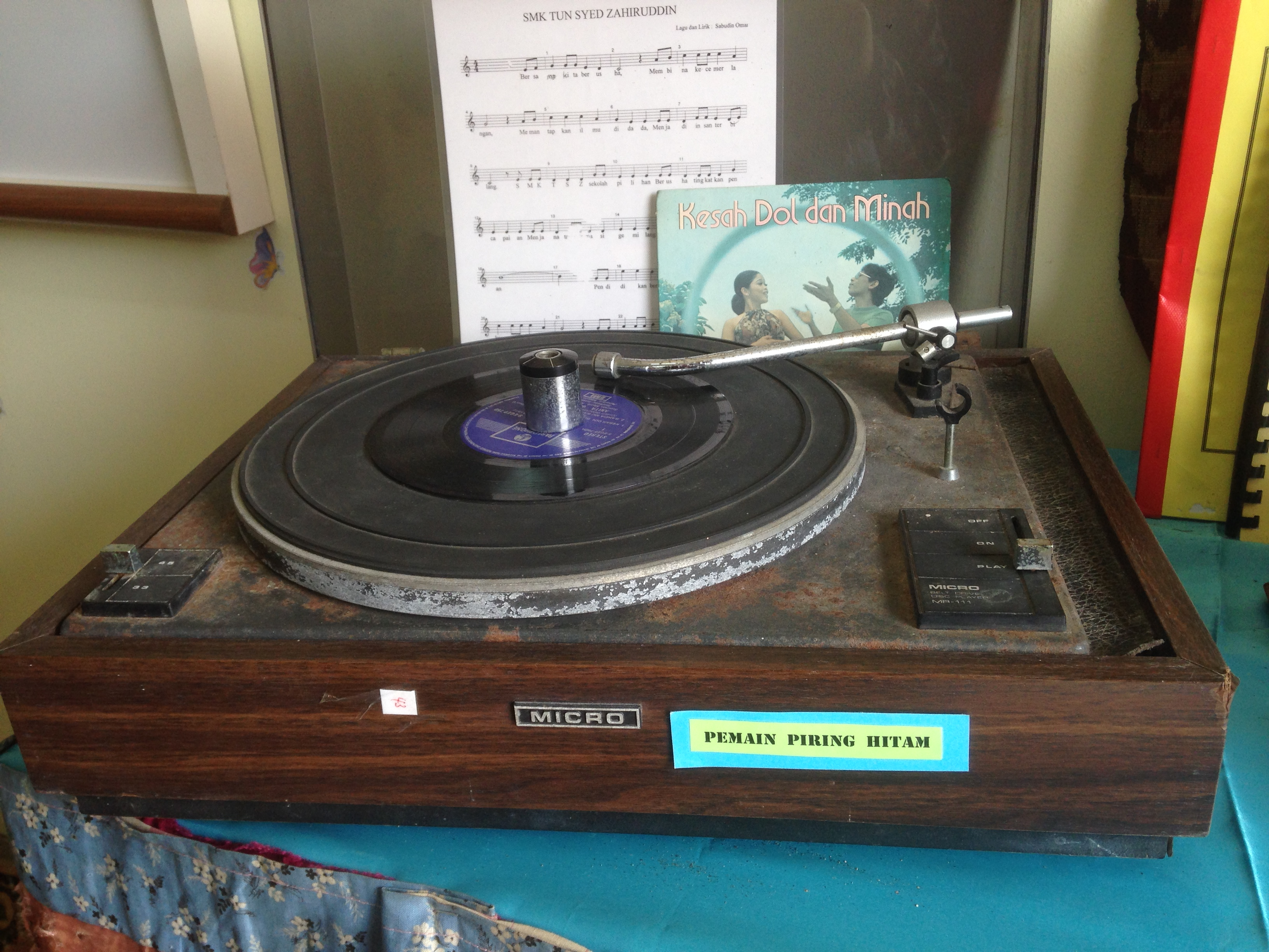 PEMAIN PIRING HITAM